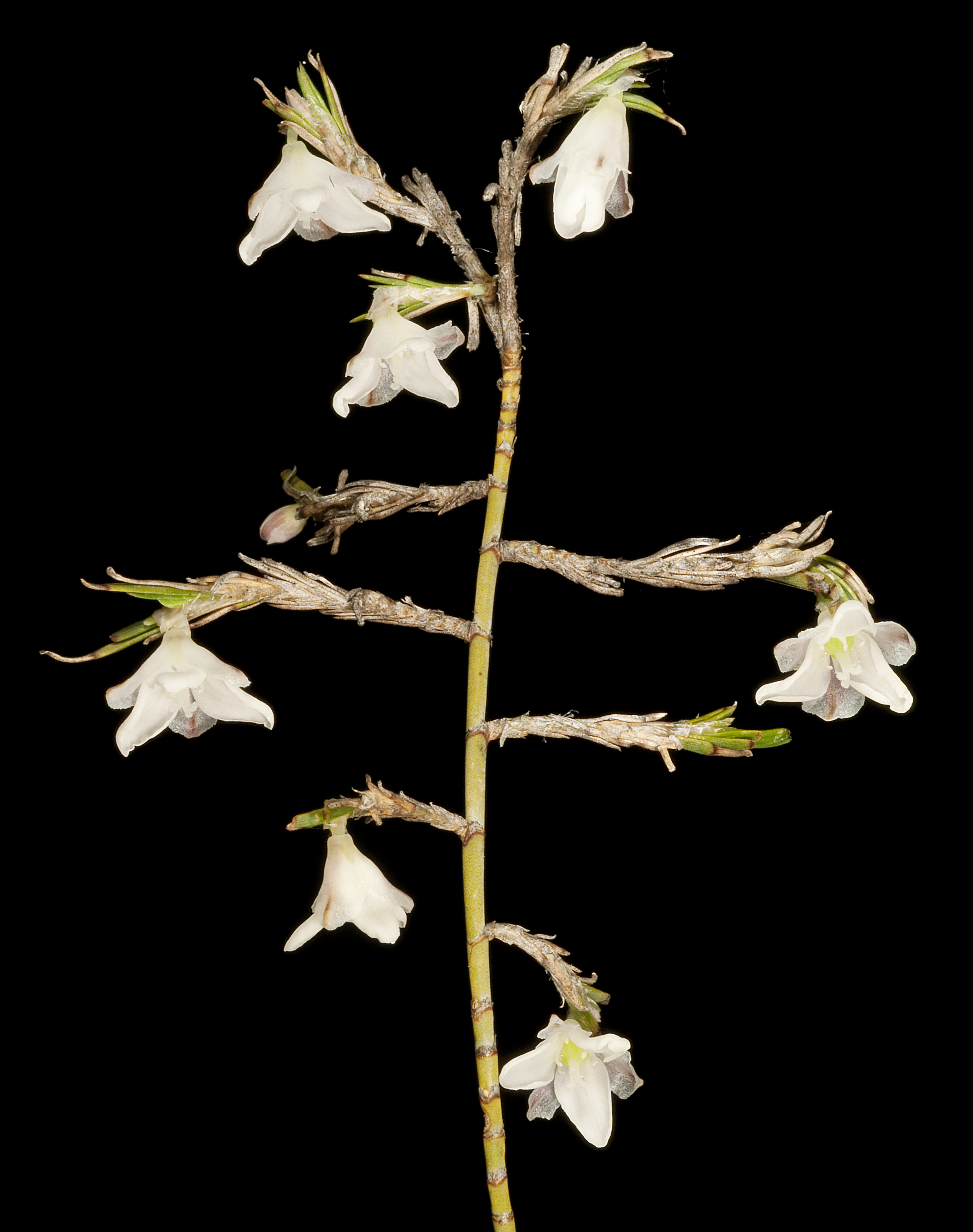 KRT4168